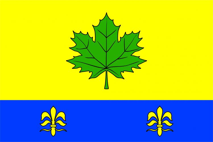 vlajka, Javorník, okres Ústí nad Orlicí